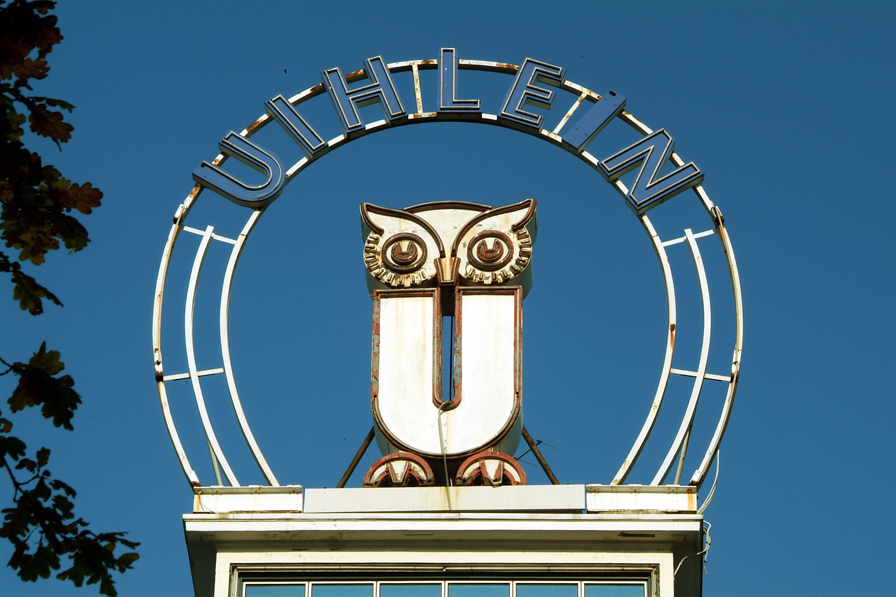 Das denkmalgeschützte Firmenzeichen des Tapetenhauses Uihlein mit der Eule auf dem Dach in der Andreaestraße 1.